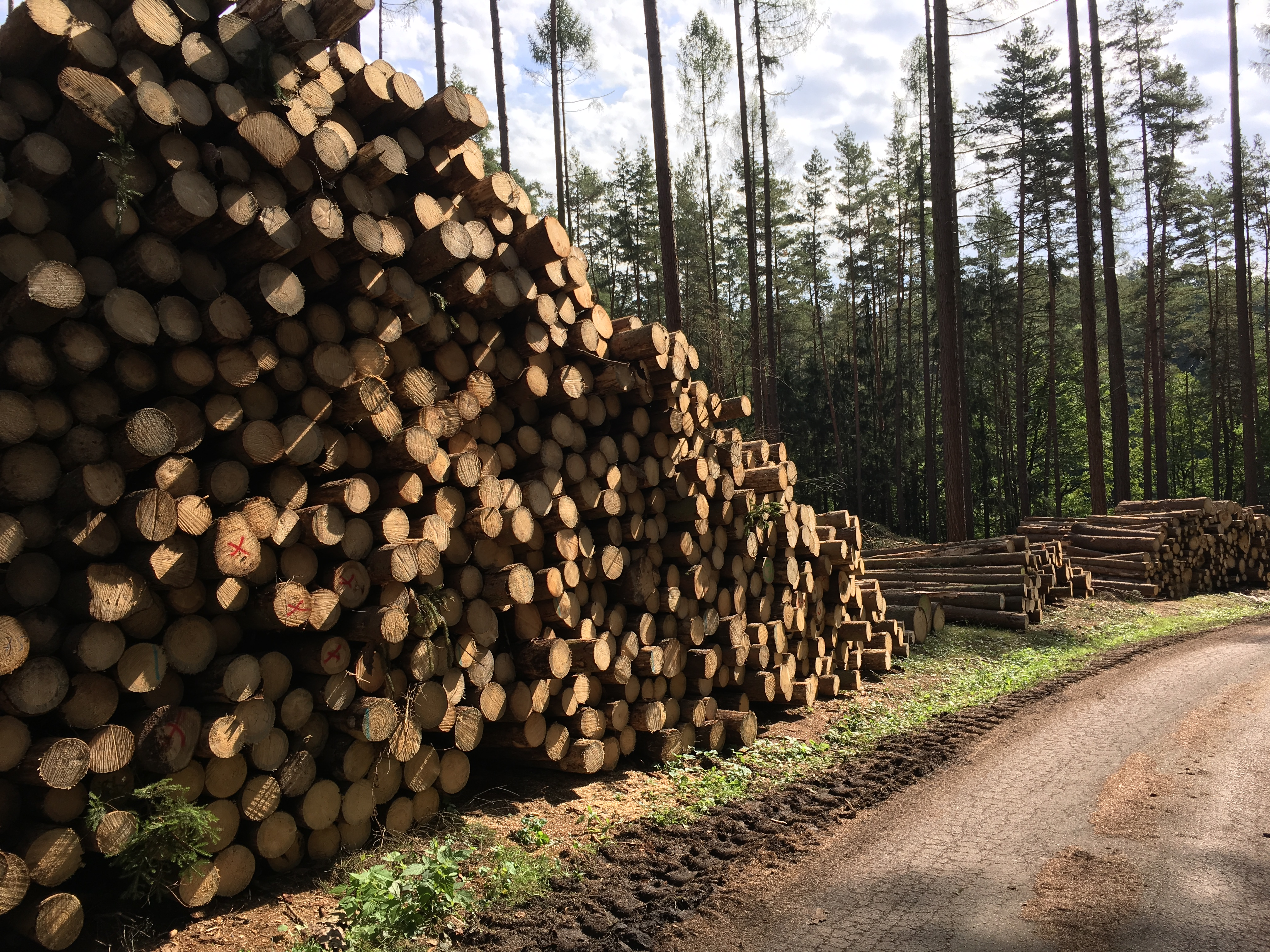 Kurovcová kalamita v Česku